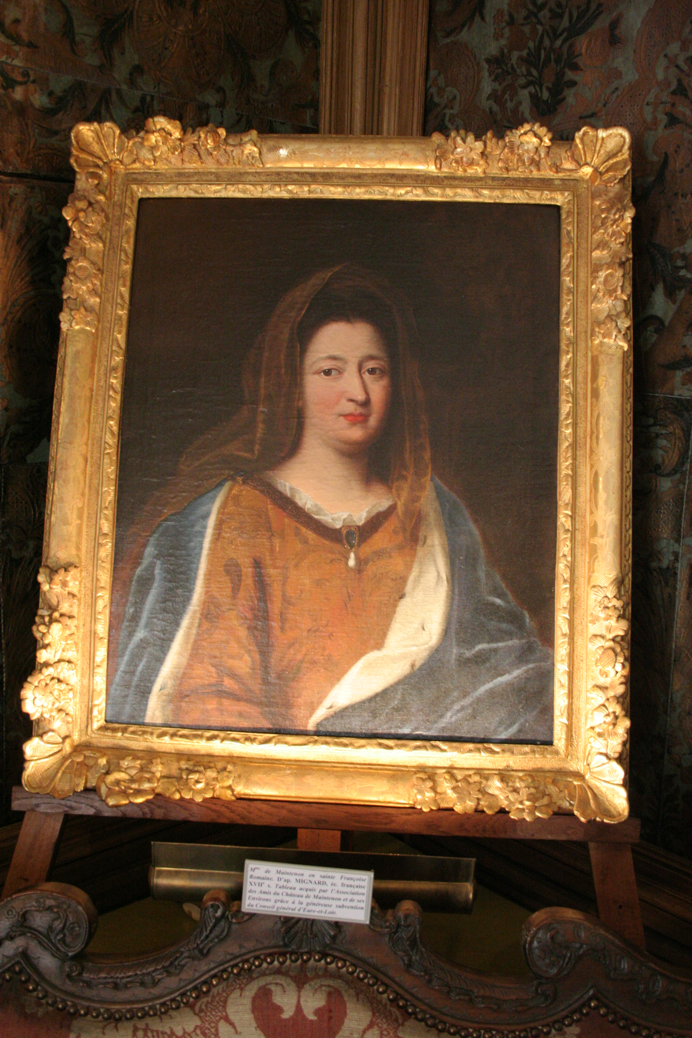 Madame de Maintenon en sainte Françoise Romaine d'après Mignard, école française XVIIe siècle, château de Maintenon, Eure-et-Loir, France.